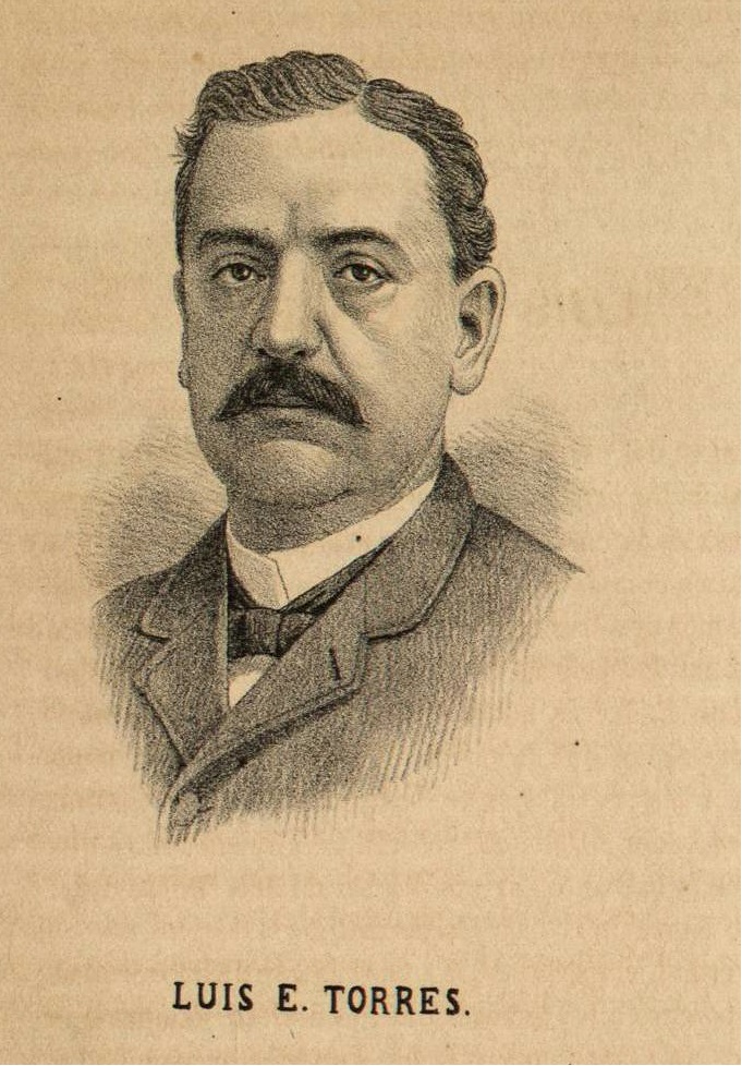 Luis Emeterio Torres